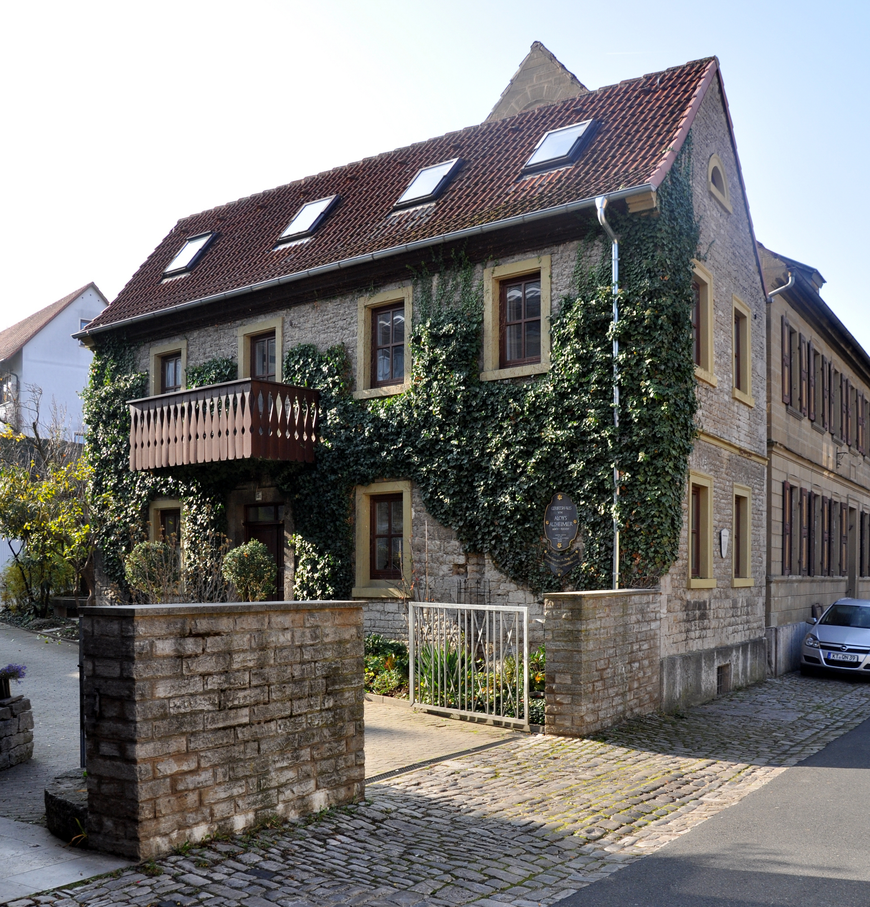 Marktbreit, Alzheimer-Geburtshaus, Ochsenfurter Straße 15a